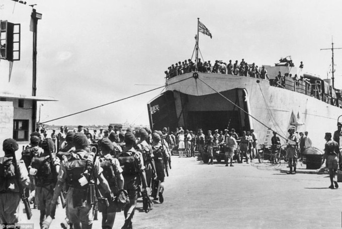 נחתת בריטית סטרייקר מפנה את גדוד הקומנדו מס 40 של הנחתים הבריטים בנמל חיפה 30 יוני 1948.